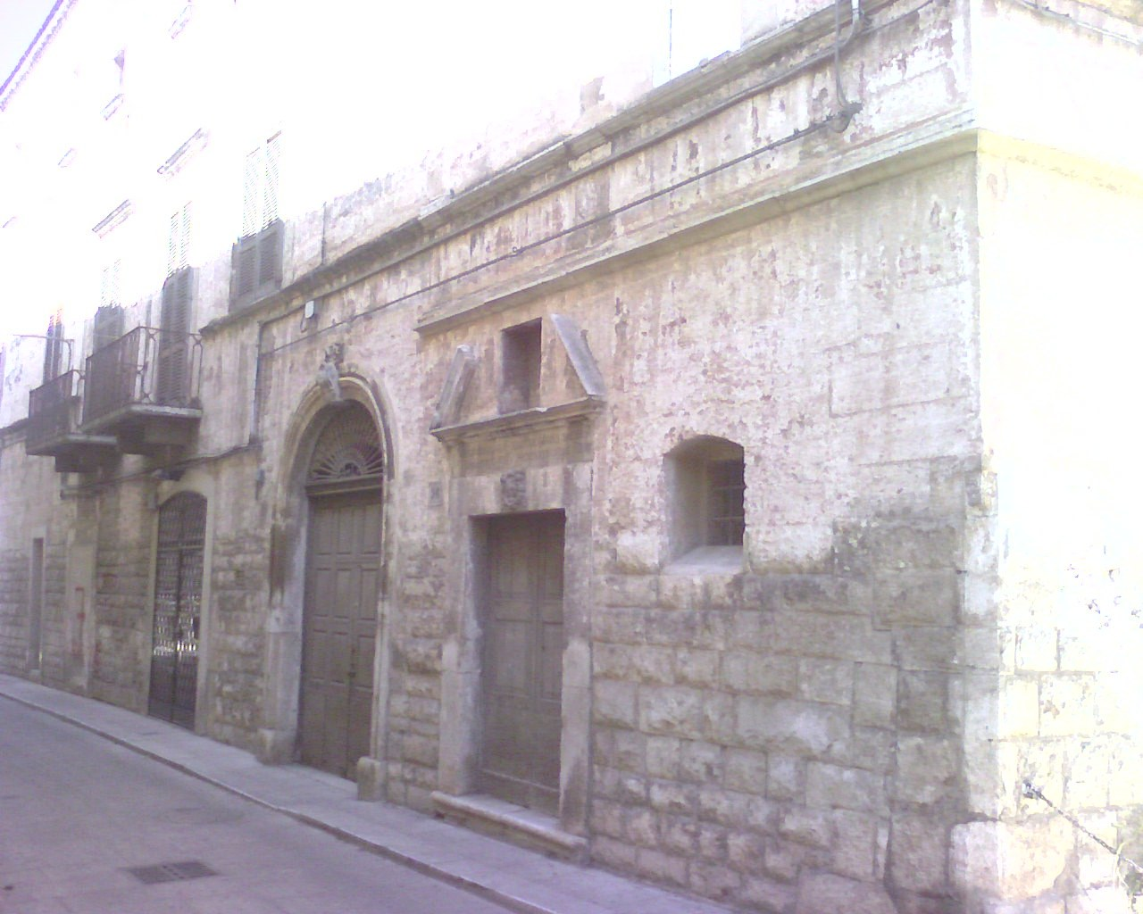 palazzo valerio-longo - Modugno (bari)-Italy